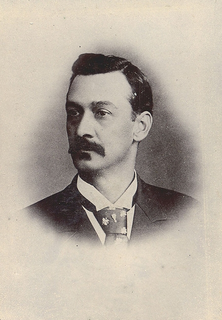 date inconnue de la prise de vue initiale